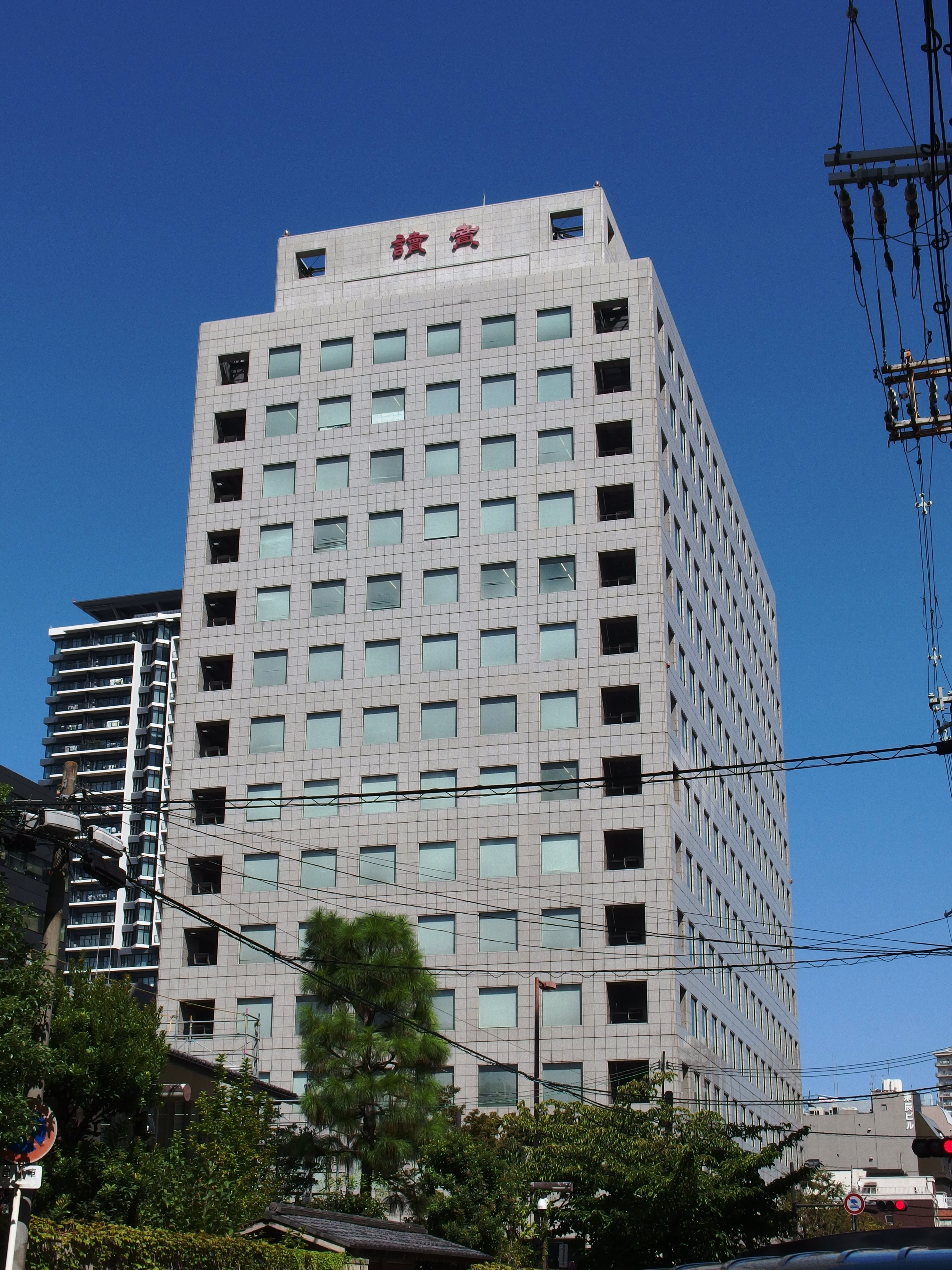 大阪市にある読売新聞大阪本社が入居する読売大阪ビル。